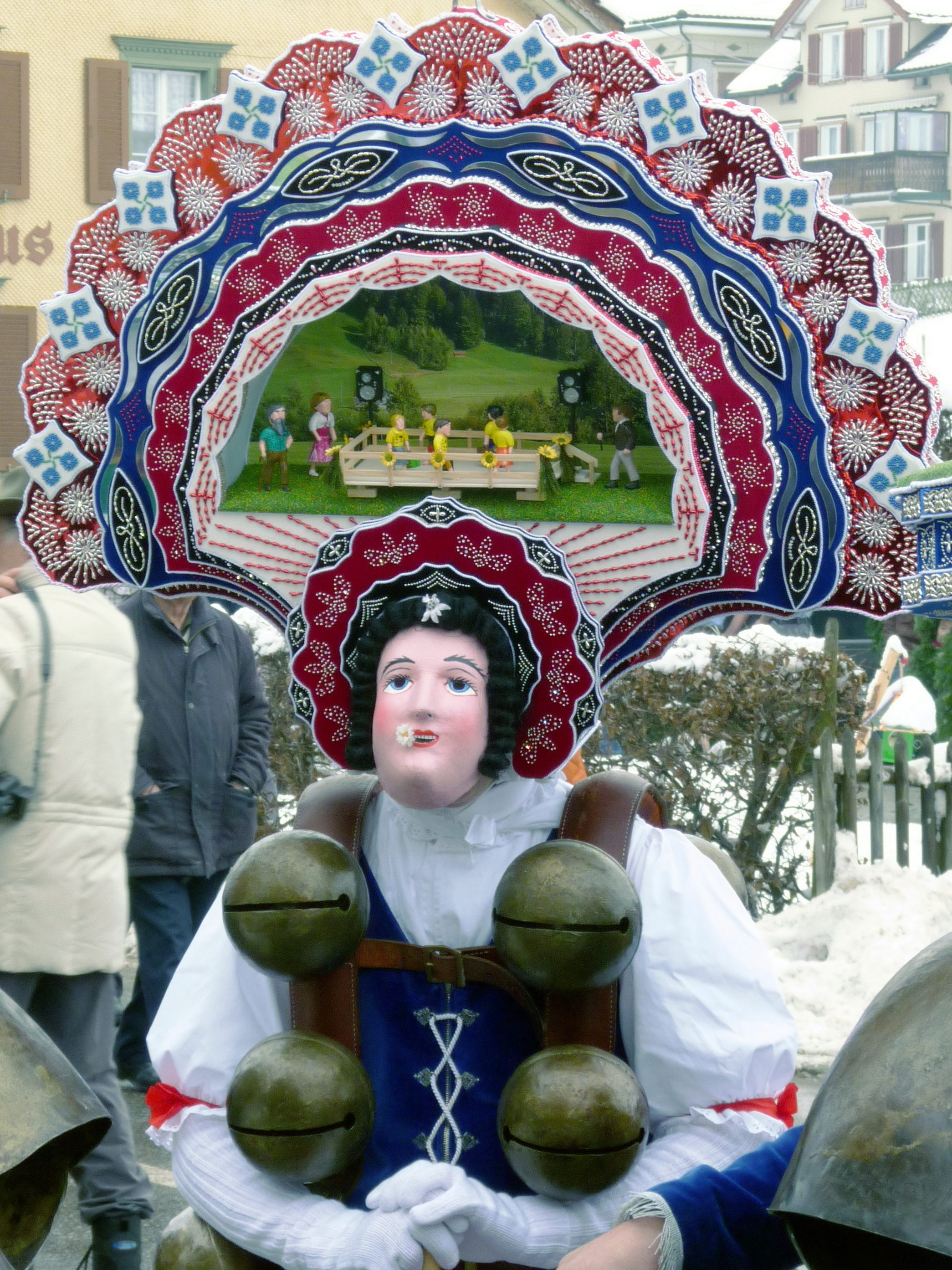 Schöner Silvesterklaus in Urnäsch